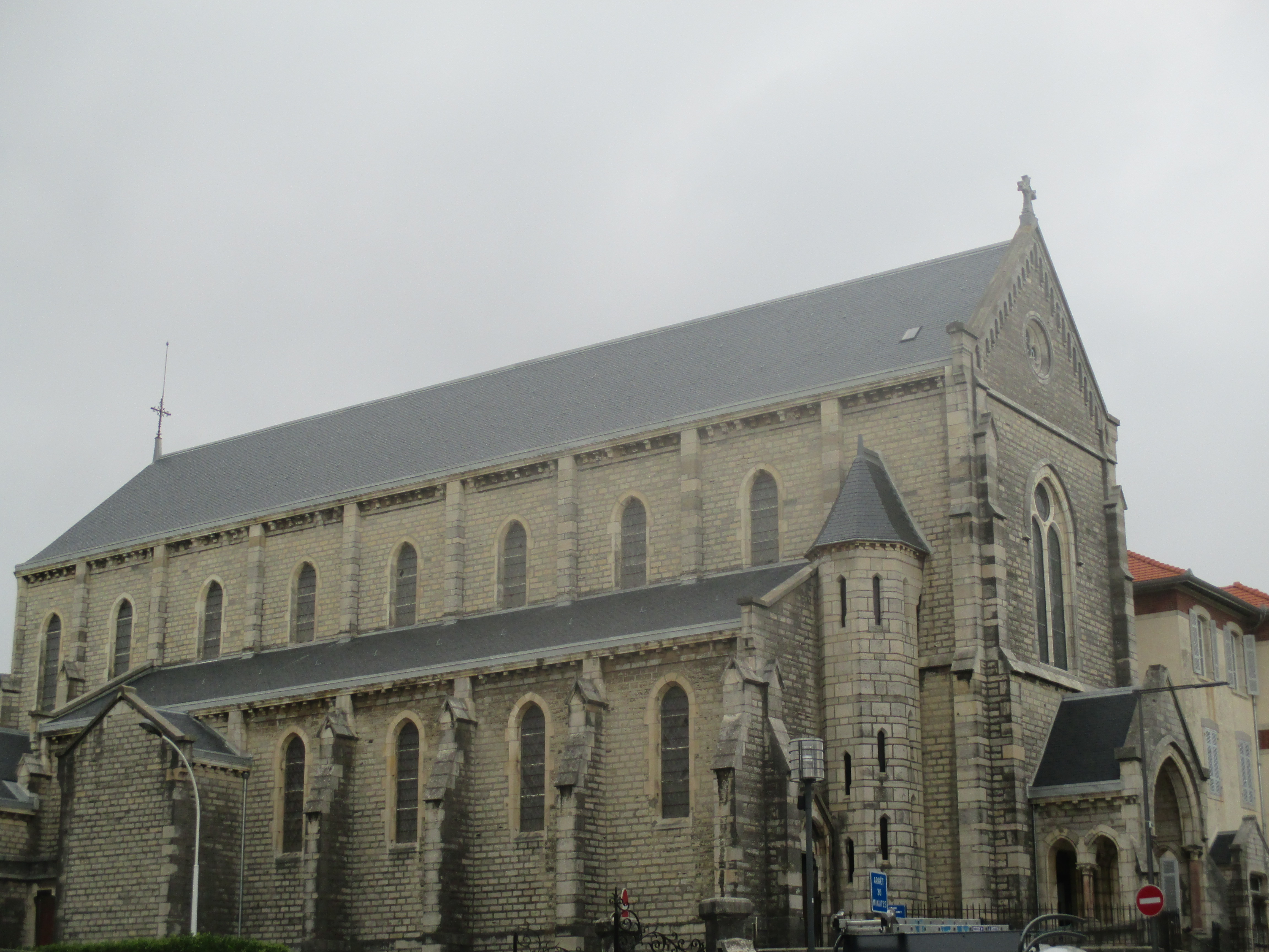 Vue de l'église Saint-Joseph de Biarritz